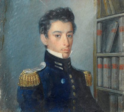 Retrato de José Tomás Argomedo atribuido a Bernardo O'Higgins.